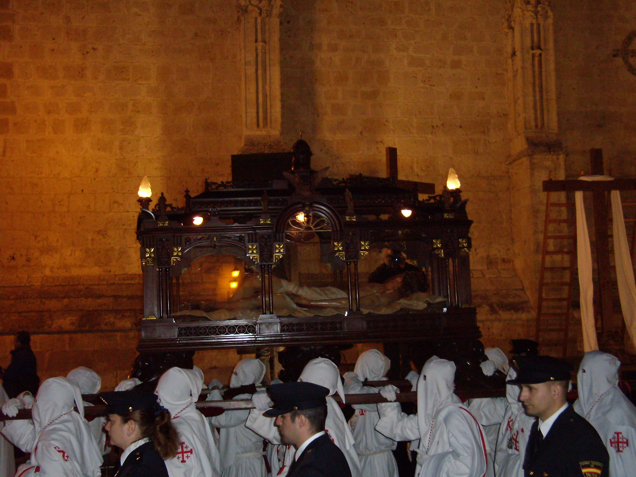 Santo Sepulcro, de Ramón Núñez (1927). Semana Santa de Palencia.